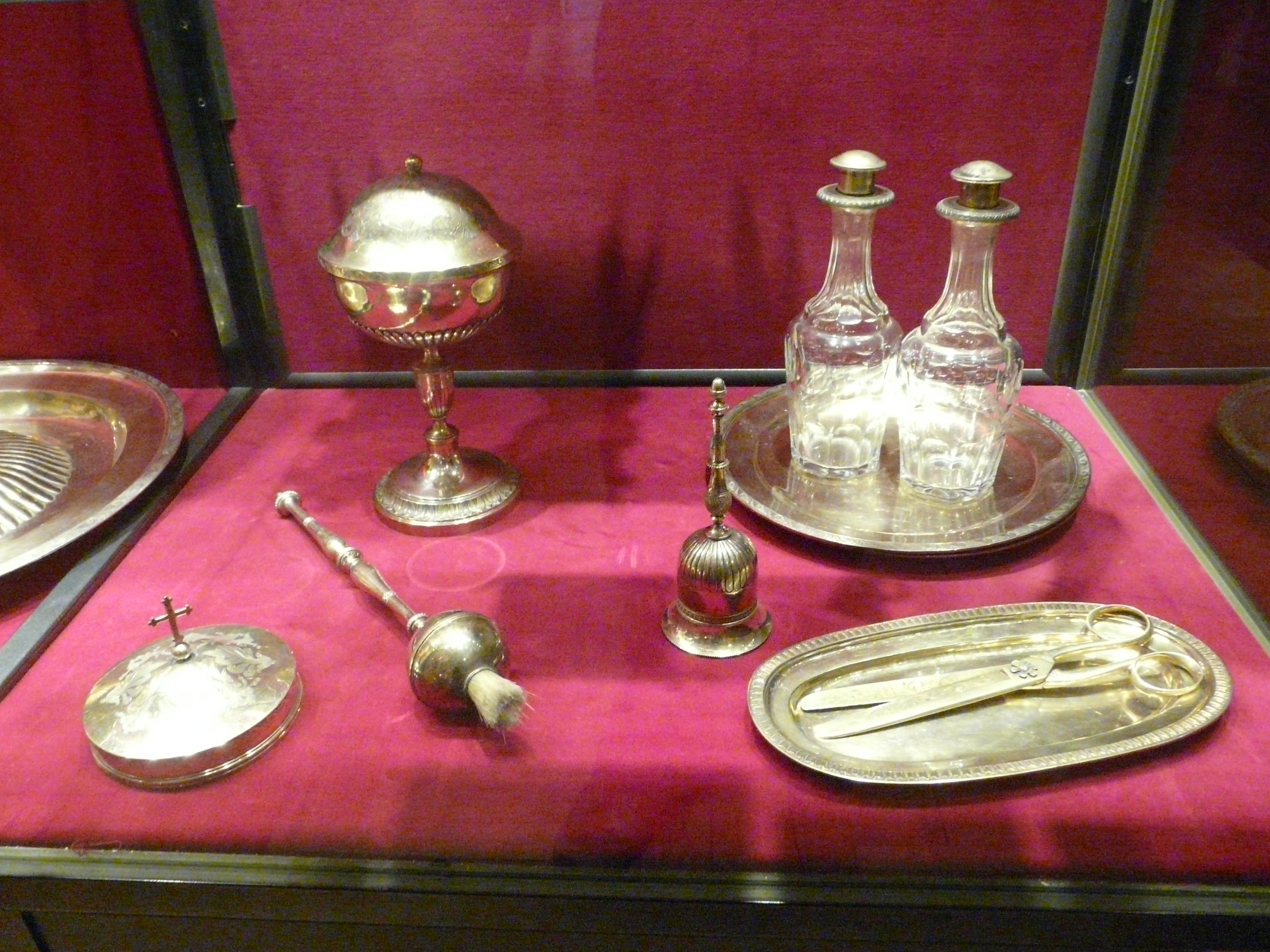 Museum of Archdiocese in Gniezno Garnitur ołtarzowy kardynała Ledóchowskiego. Jest to zestaw (jakby serwis) grupujący różne naczynia i sprzęty liturgiczne. Obejmuje on m.in. kielich, puszkę na komunikaty, tackę z ampułkami, flakony szklane, hostiarkę, kadzielnicę, łódkę do kadzidła, lavabo biskupie (dzban z misą), dzownek, tacki na piuske i pektorał, nożyce do tonsury, bugię (mały lichtarzyk), muszęl do sypania ziemi na trumnę, kropidło oraz kielnię do wmurowywania portatylii. Były to przedmioty niezbędne podczas liturgii pontyfikalnej oraz służące biskupom do wypełnienia ich obowiązków. Srebro częsciowo złocone, repusowane, stancowane i cyzelowane. Wykonane w Fuldzie przez firmę Papista ok. 1862-1865 r.. Wykazuje wyraźne cechy klasycystyczne. To jeden z największych tego typów zestawów na świecie. Jest darem króla Belgii Leopolda I z roku 1865 dla wówczas jeszcze biskupa Mieczysława Ledóchowskiego, nuncjusza papieskiego w Brukseli, z okazji zakończenia służby dyplomatycznej i przejścia na stolicę gnieźnieńsko - poxnańską. See also: Imaage:Museum of Archdiocese in Gniezno - zestawLedóchowskiegoo 02.JPG and Image:Museum of Archdiocese in Gniezno - zestaw Ledóchowskiego 03.JPG